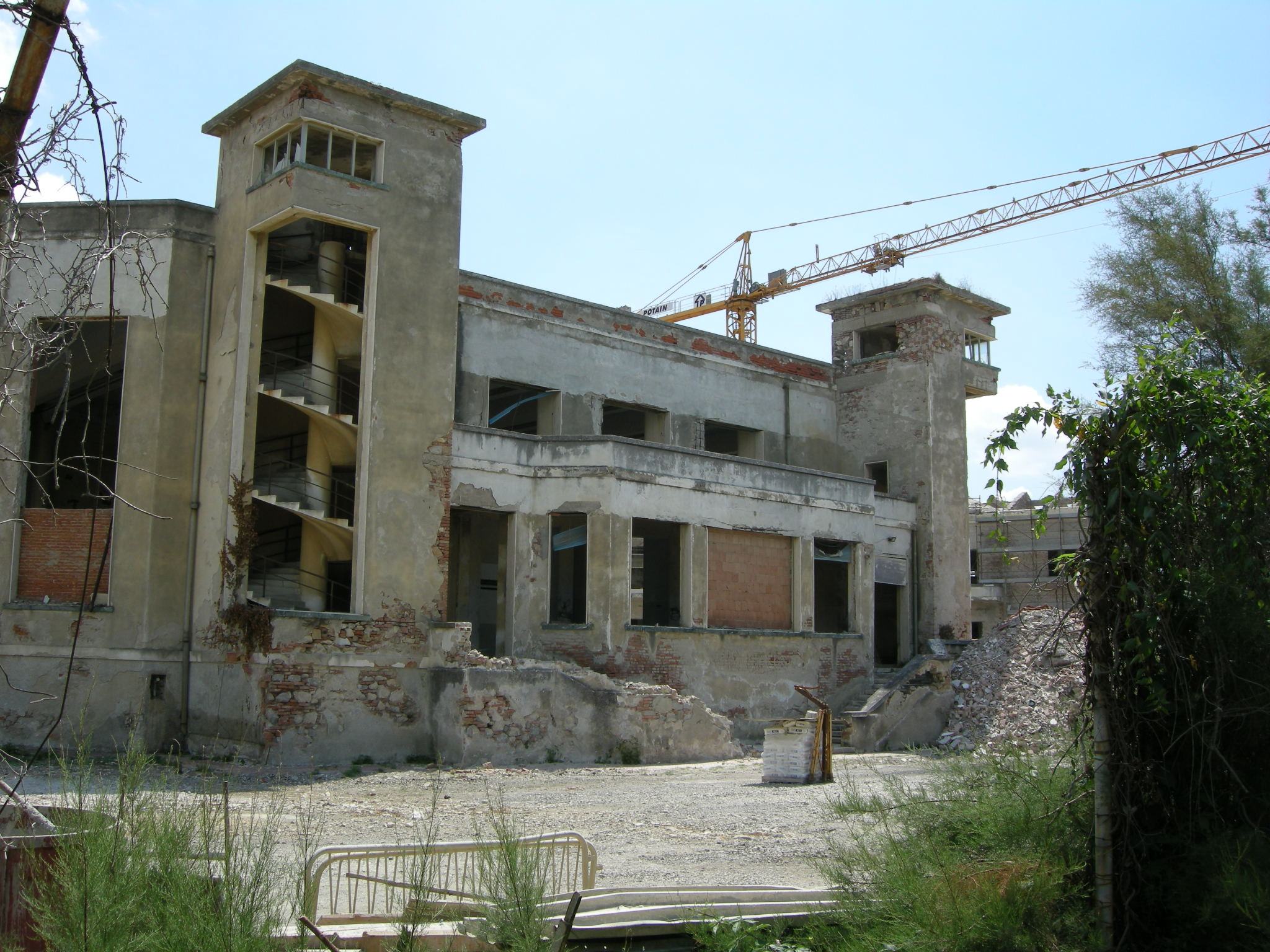 Colonia vittorio emanuele II.